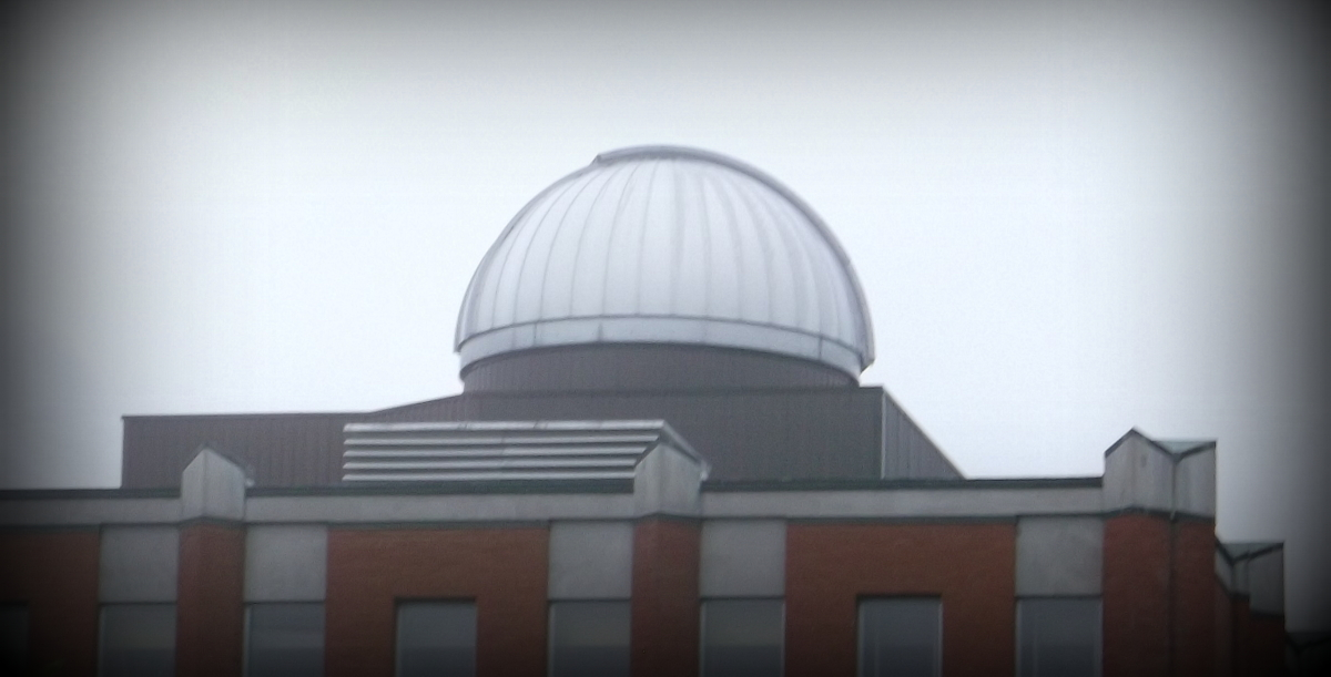 Observatoire de l`université Bishop